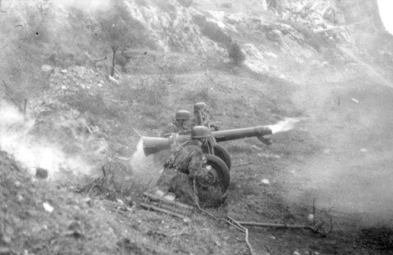 San Felice (Monte Circeo).- Besichtigung des Abschnitt Süd durch KG [kommandierenden General] Information added by Wikimedia users.Das Foto zeigt ein 10,5cm Leichtgeschütz 40.